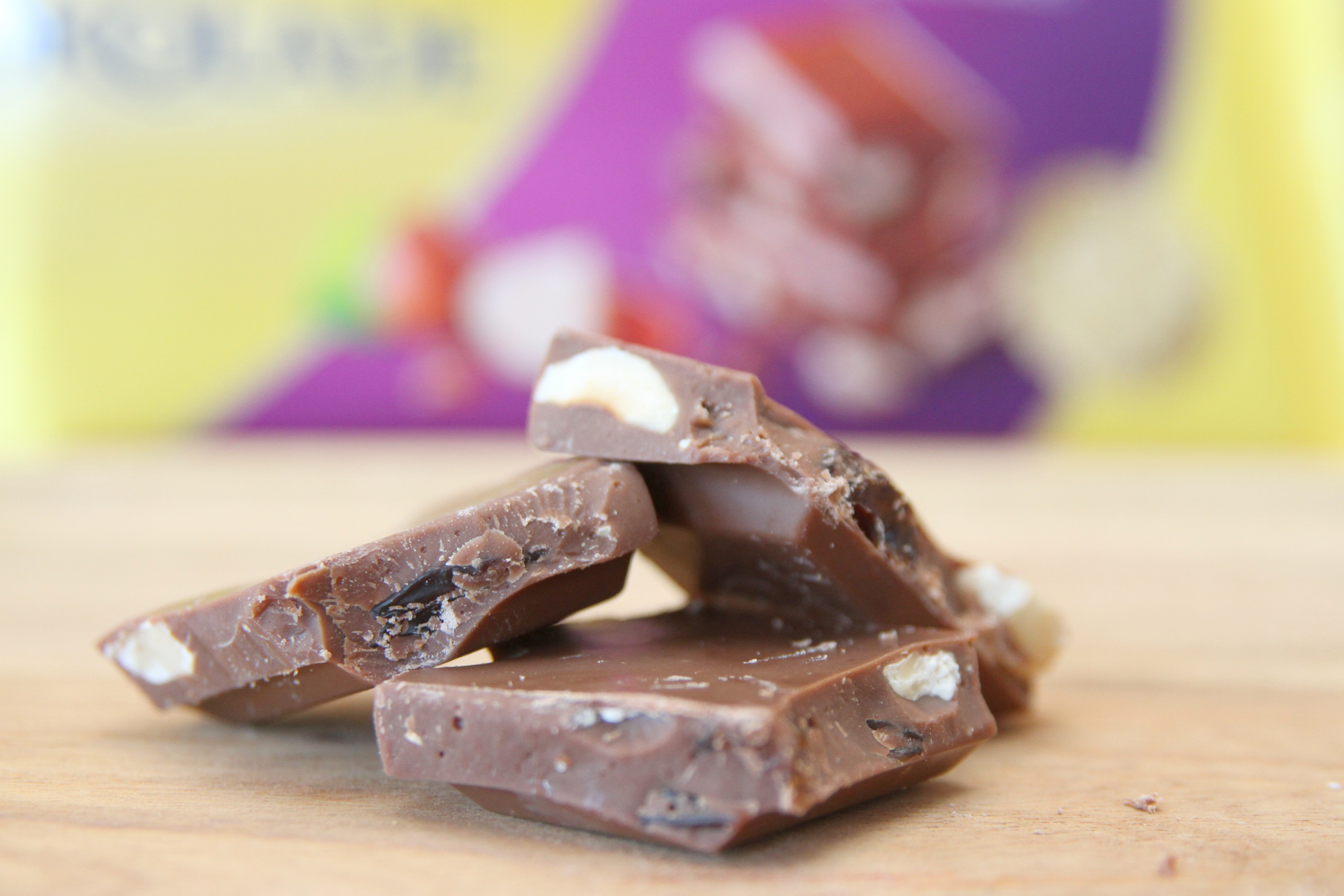 Sjokoladen Fruktnøtt.